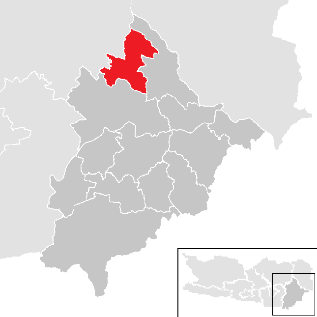 Bezirk Völkermarkt